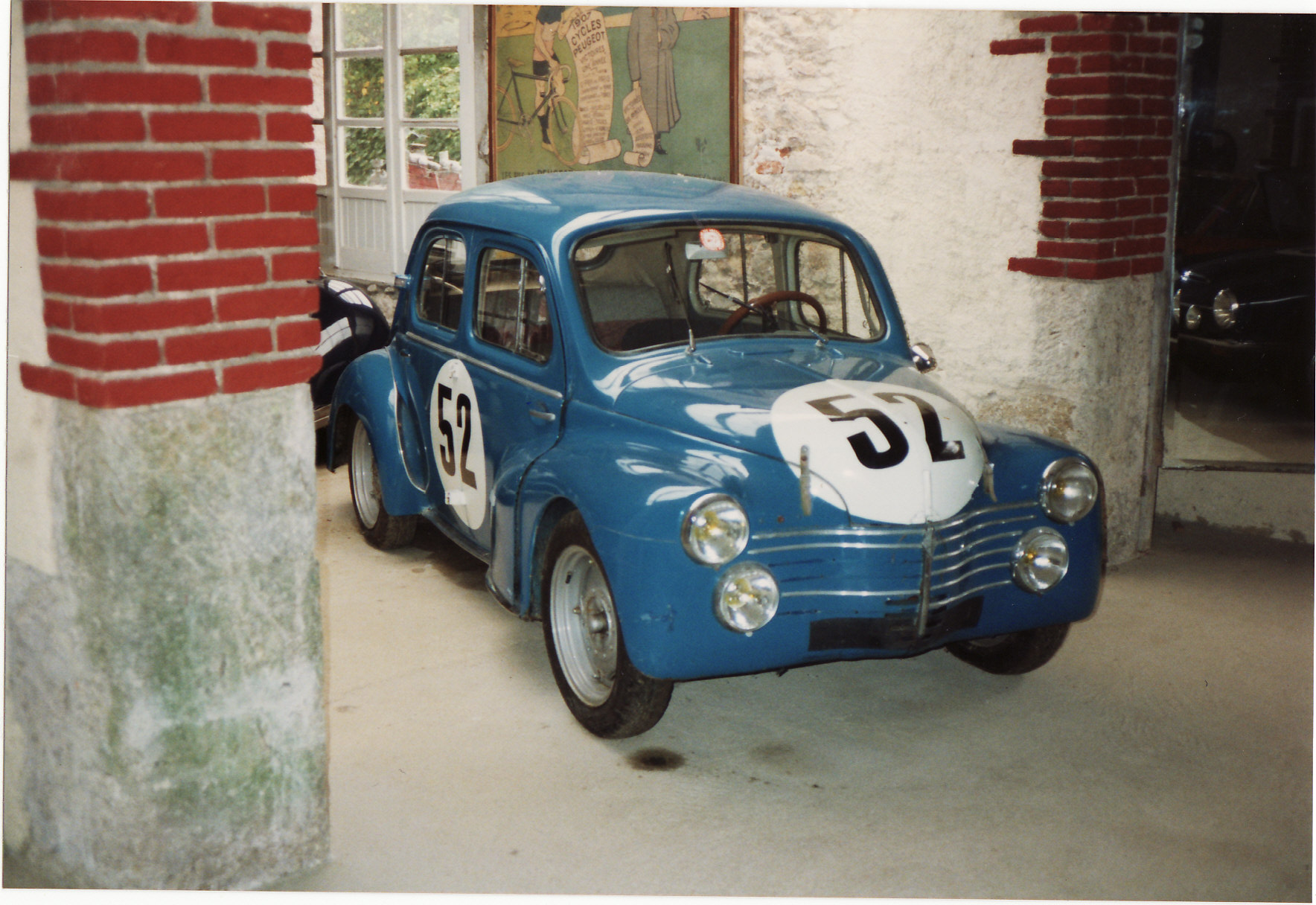 Renault 4CV LeMans Racer